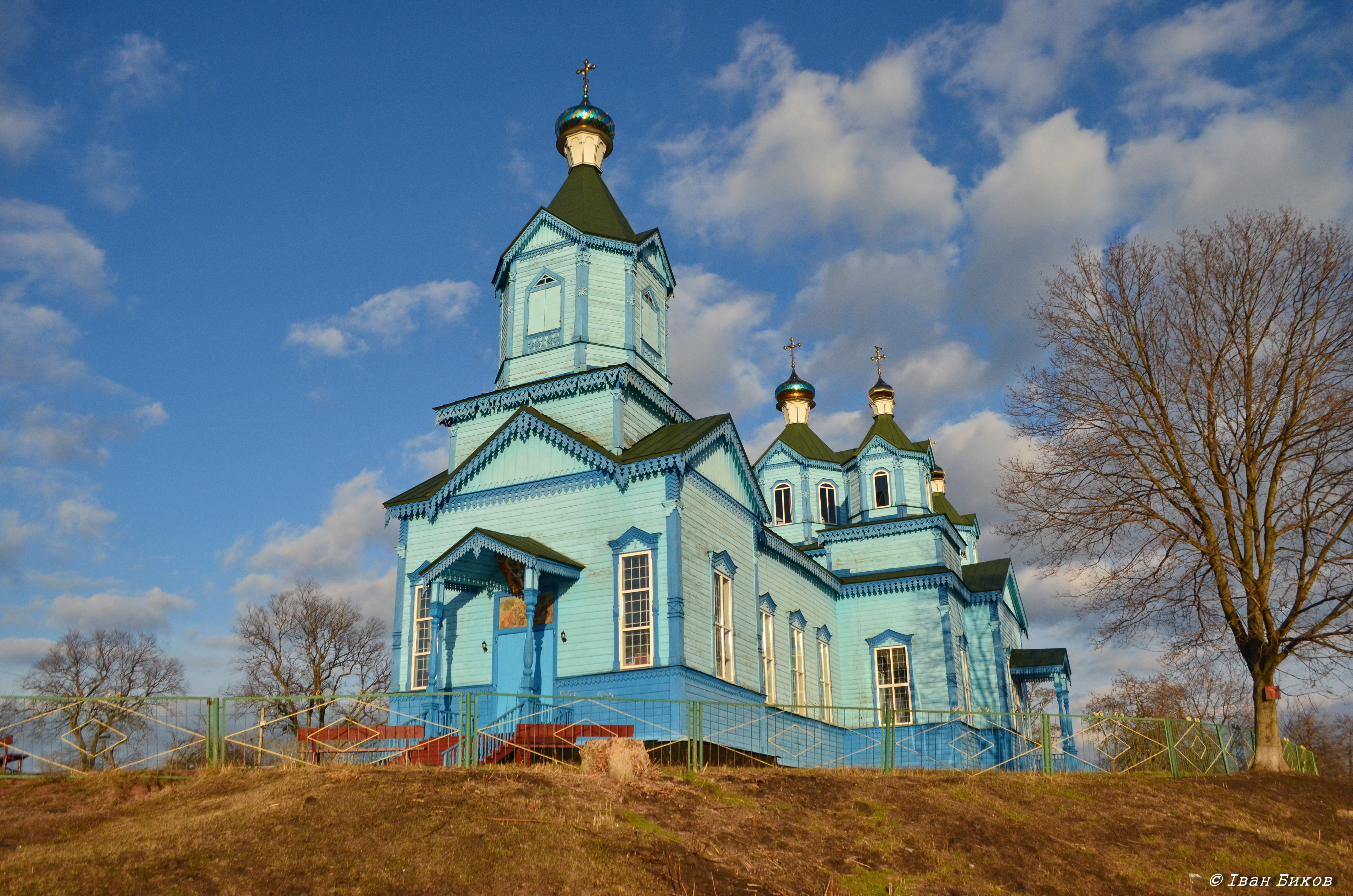 Рогозів. Дерев'яна Миколаївська церква 1892 року